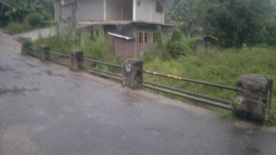 உடதலவின்ன இலங்கையின் மத்திய மாகாணத்திலுள்ள கண்டி மாவட்டத்தில் அமைந்துள்ள ஒரு நகரமாகும்.